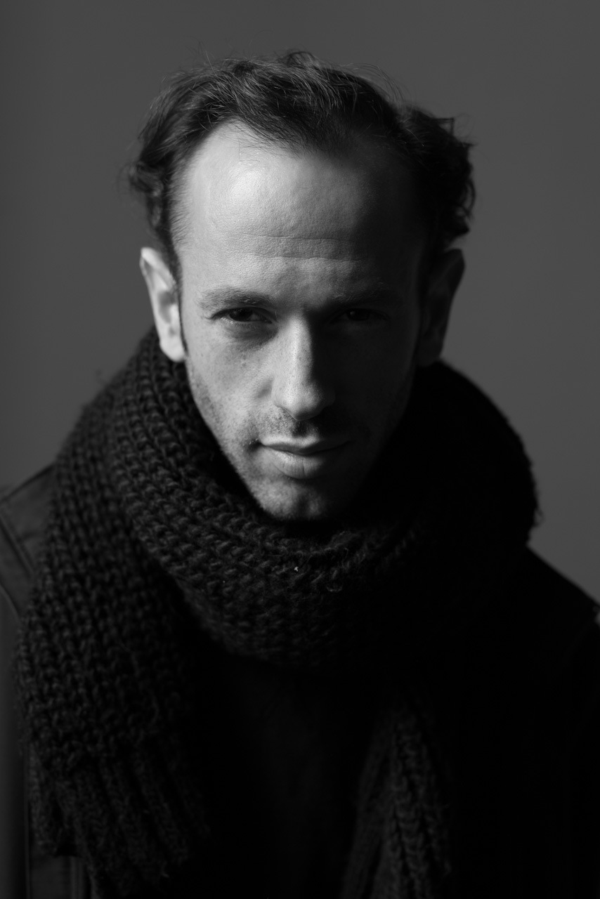 Leandro Taub